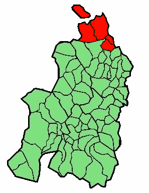 aipaturiko eskualdearen kokapena Nafarroa Beherean